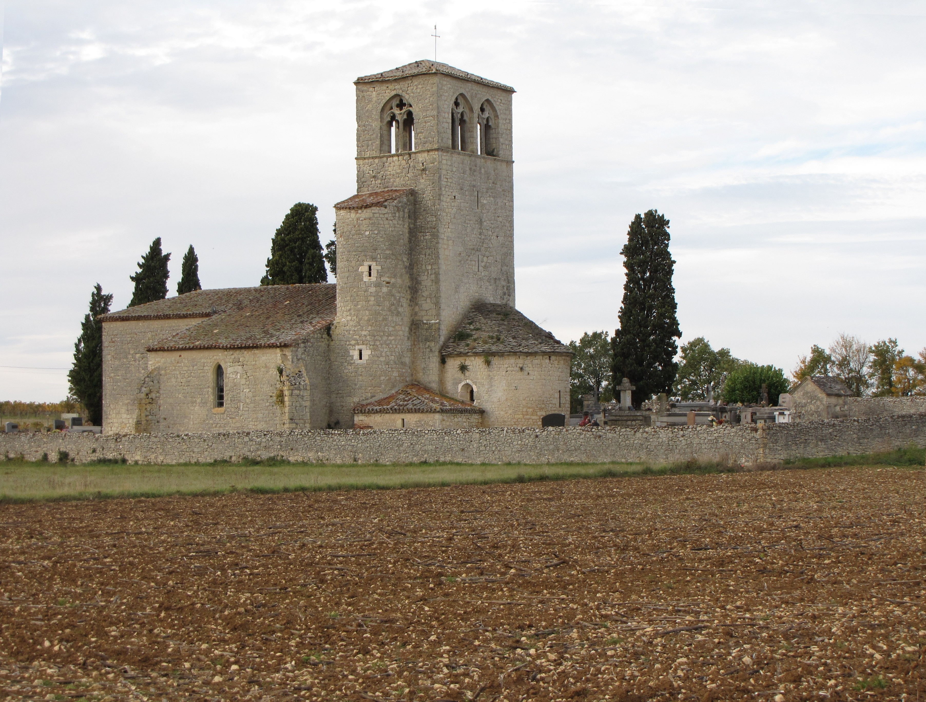 Mauroux (Lot) église de Cabanac